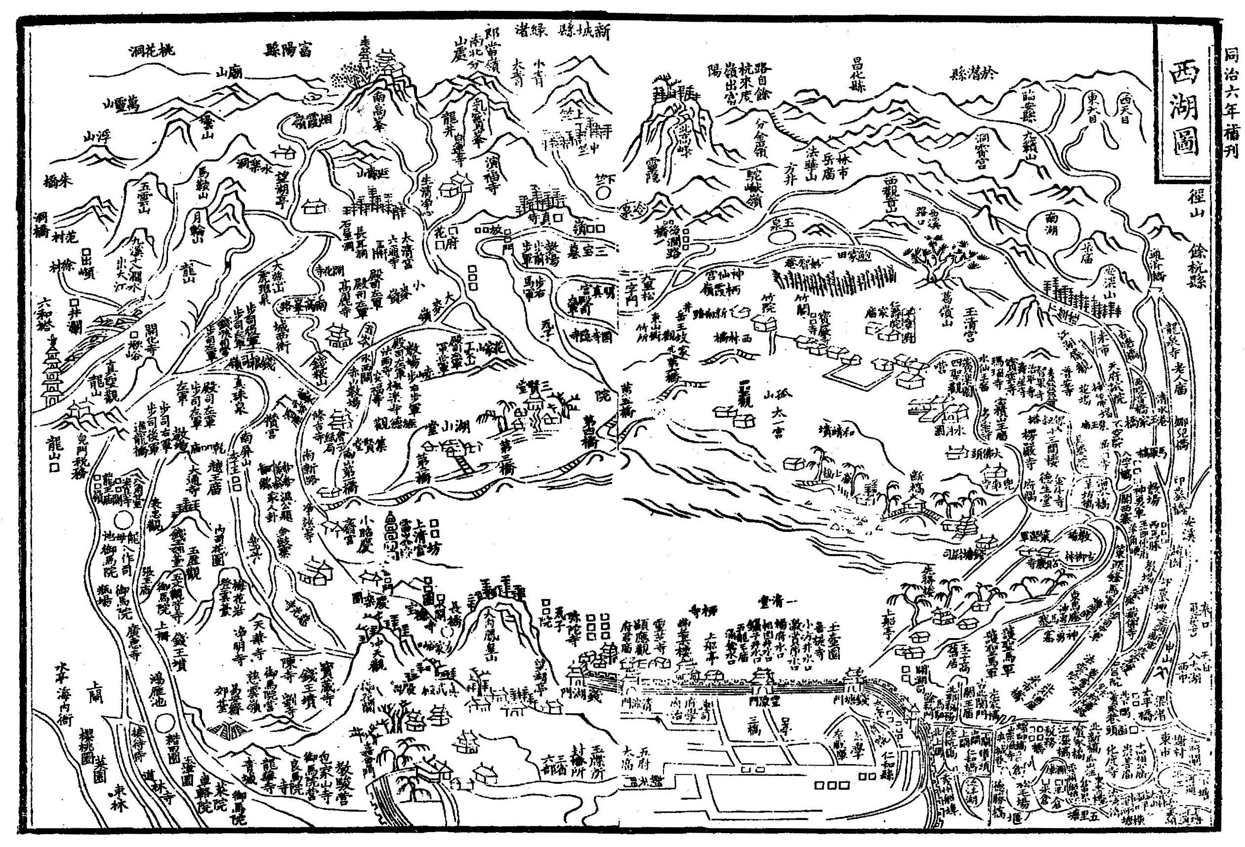 宋代杭州西湖地图。